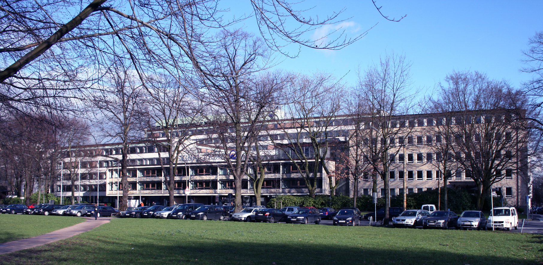 Hauptverwaltungsgebäude der Signal Iduna Versicherungsgruppe am Dammtorbahnhof Hamburg